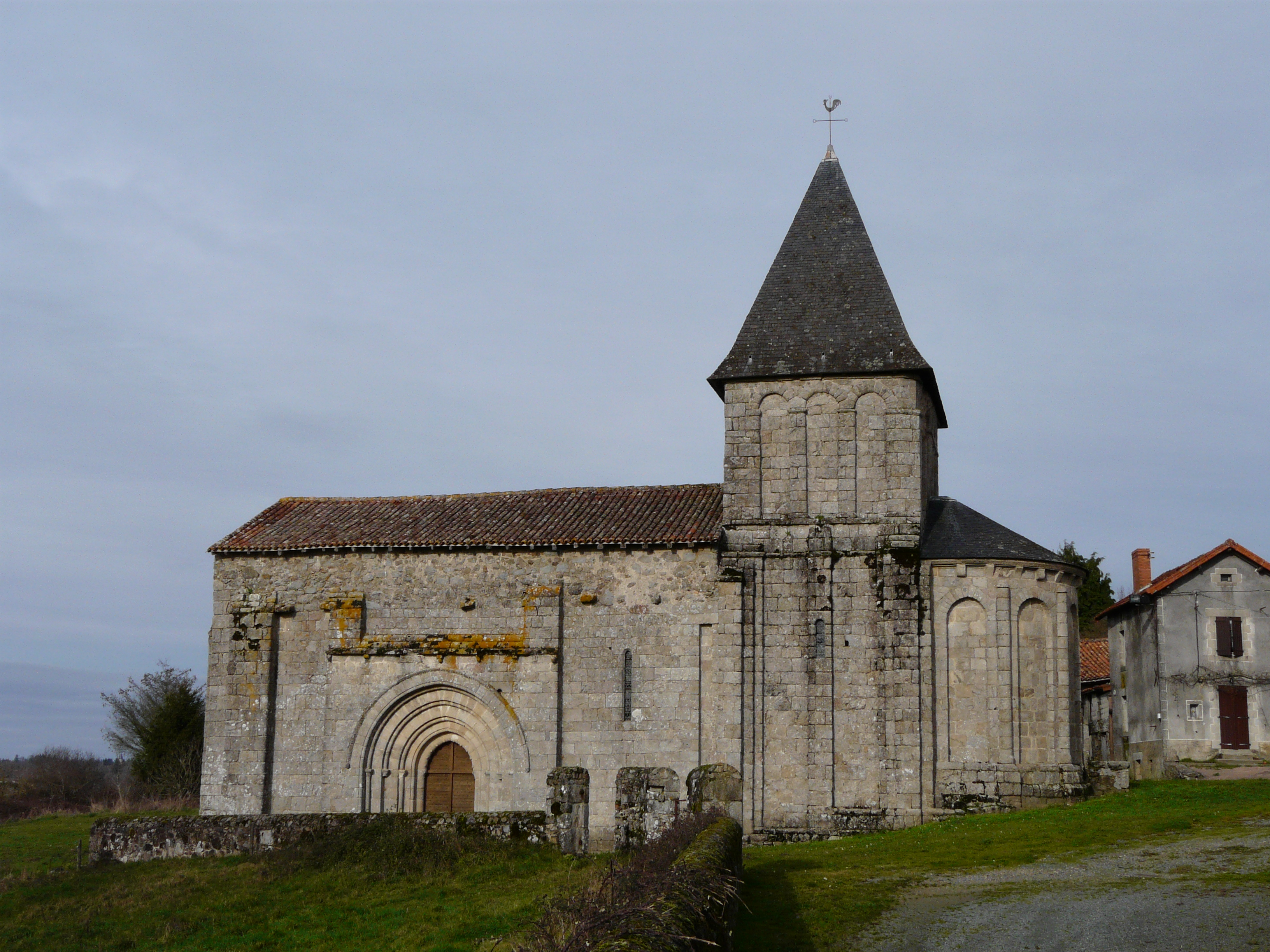 Le côté sud de l'église Saint-Paul de Reilhac, Champniers-et-Reilhac, Dordogne, France.